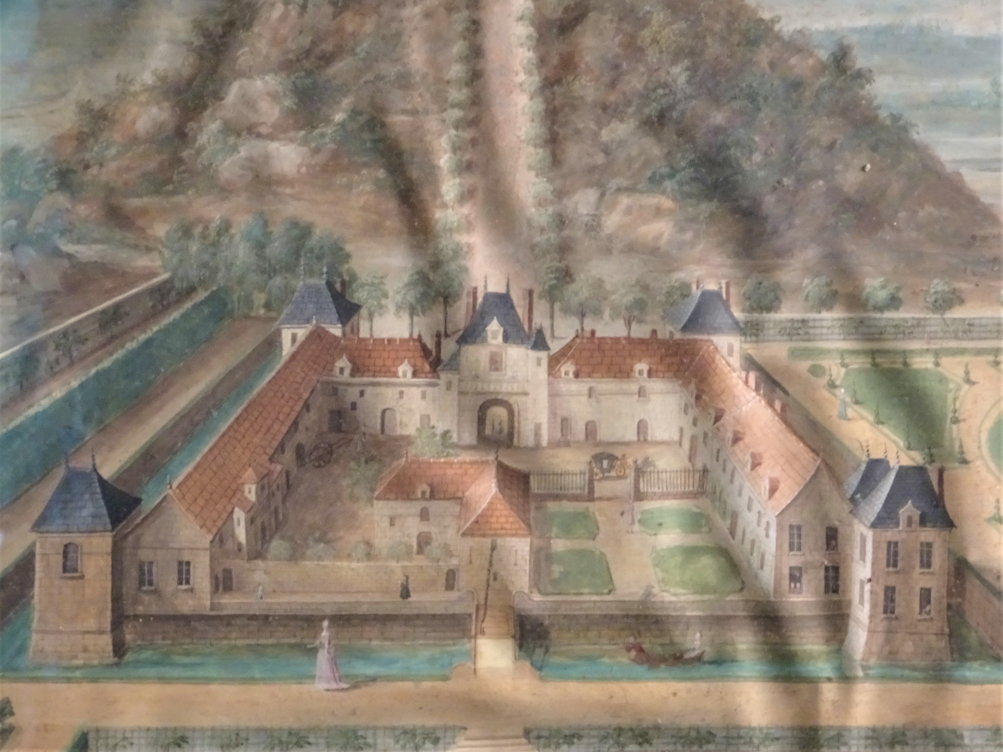 Etat du Saussay du XVIème siècle aux années 1710